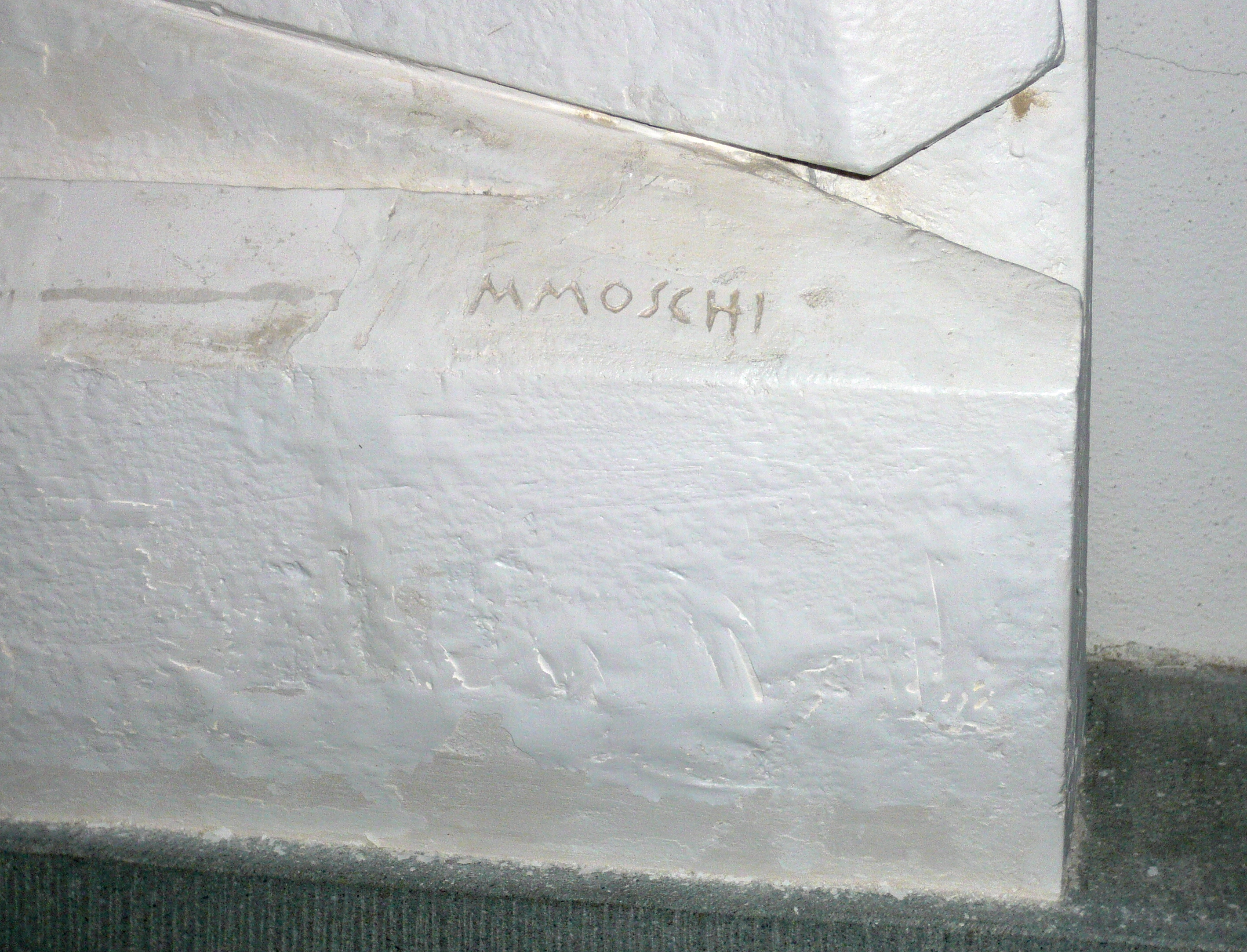 Mario Moschi (Lastra a Signa 06/05/1896 - Firenze 26/05/1971) La Resurrezione - 1945/1950 Particolare